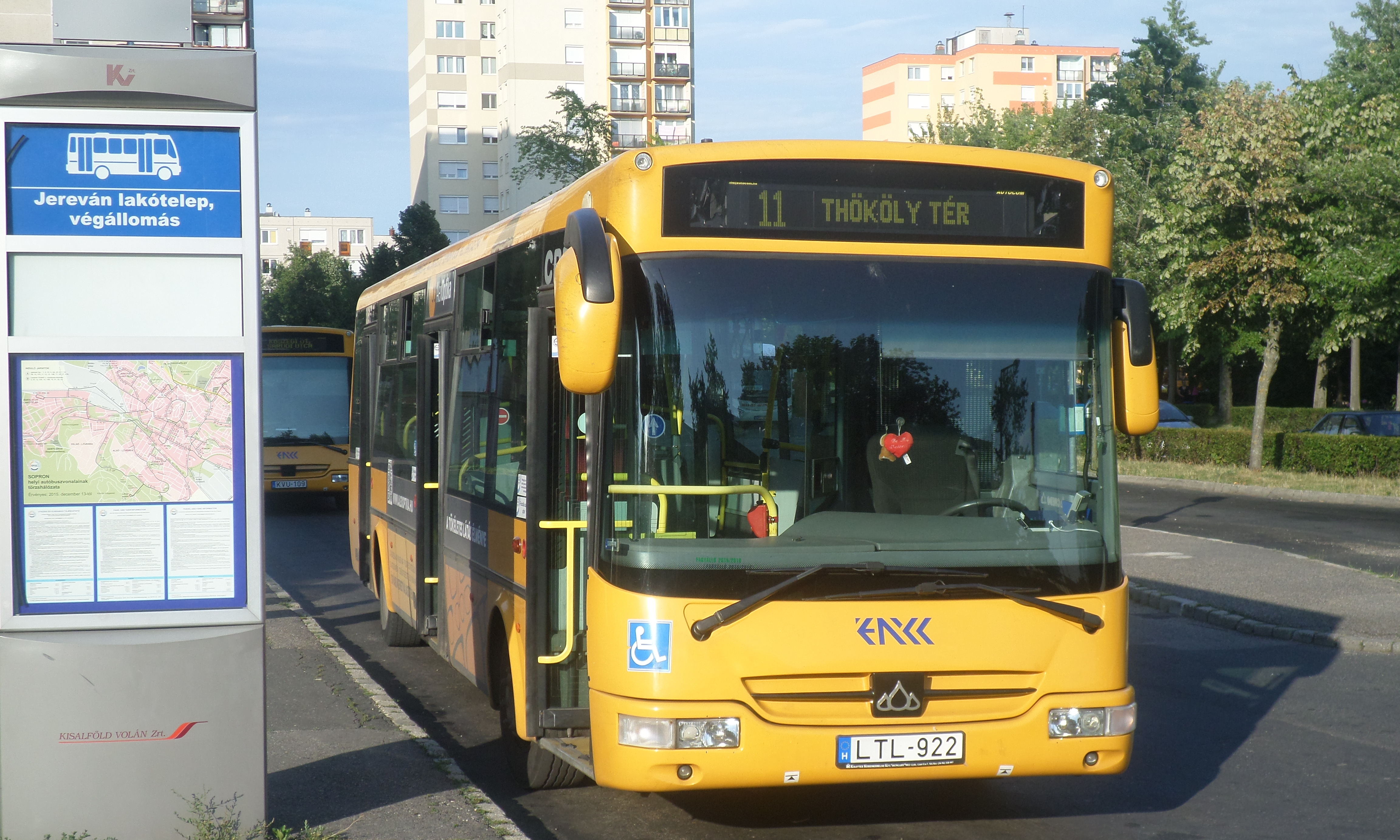 A képen a soproni 11-es jelzésű autóbusz látható a Jereván lakótelepi végállomásán.